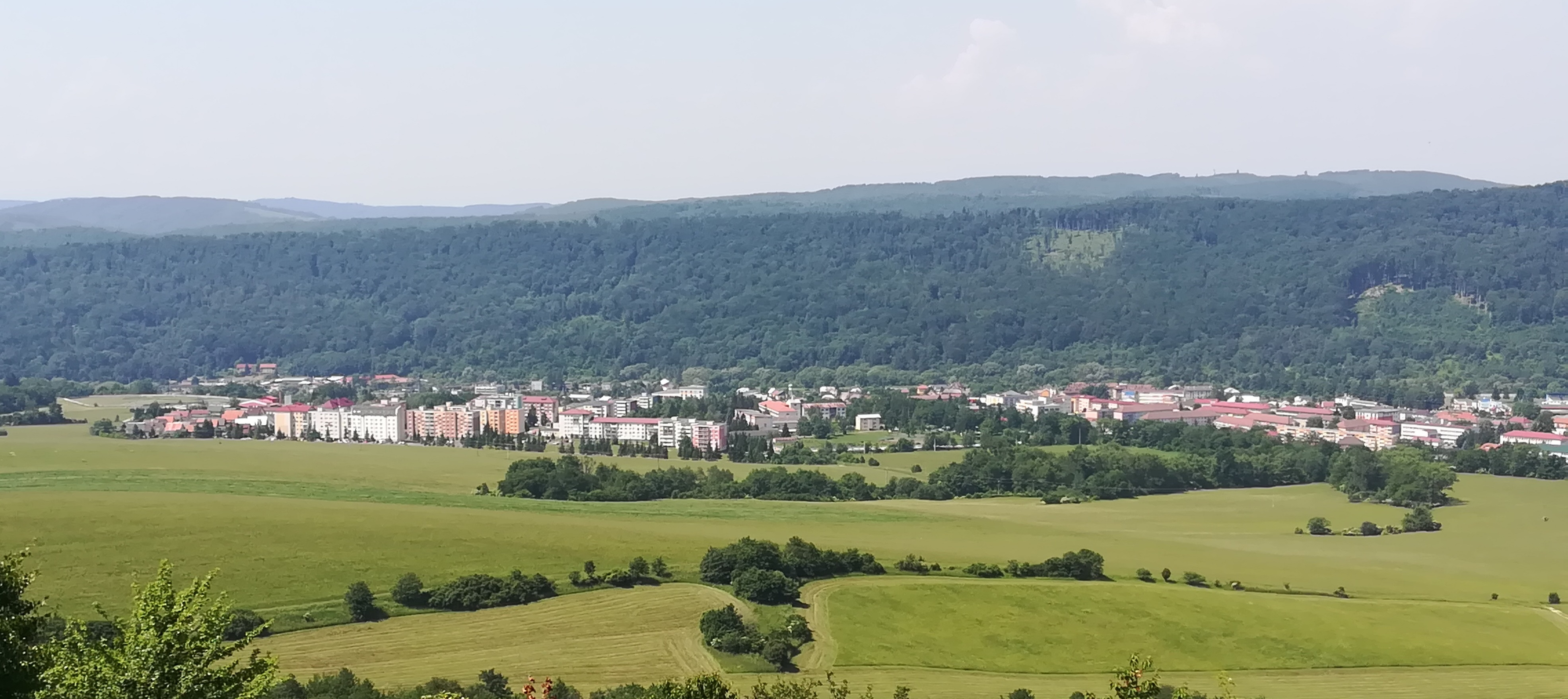 Medzilaborce (SK)